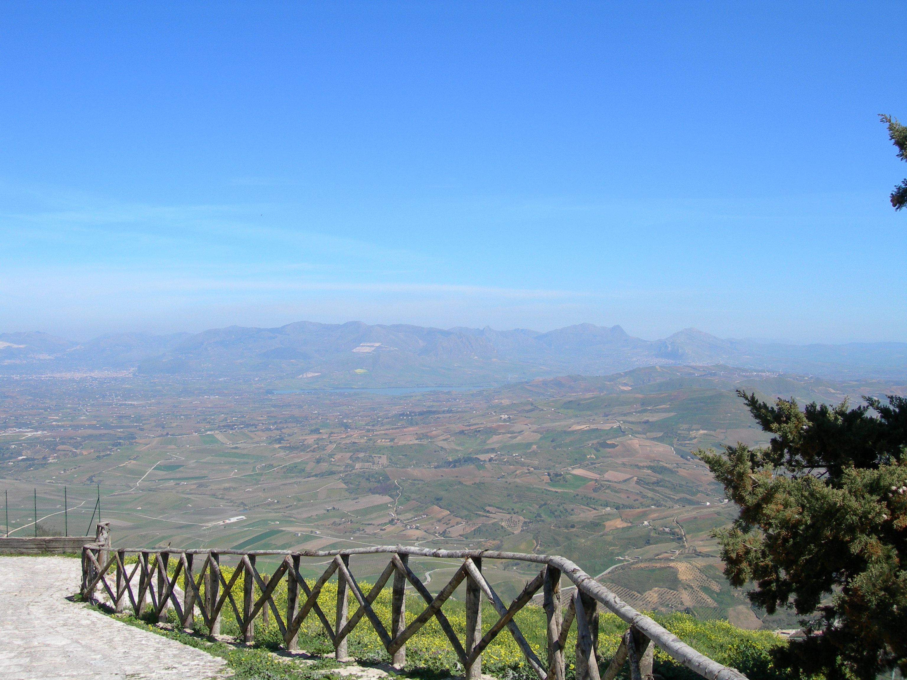 Campagna nei pressi di Alcamo.